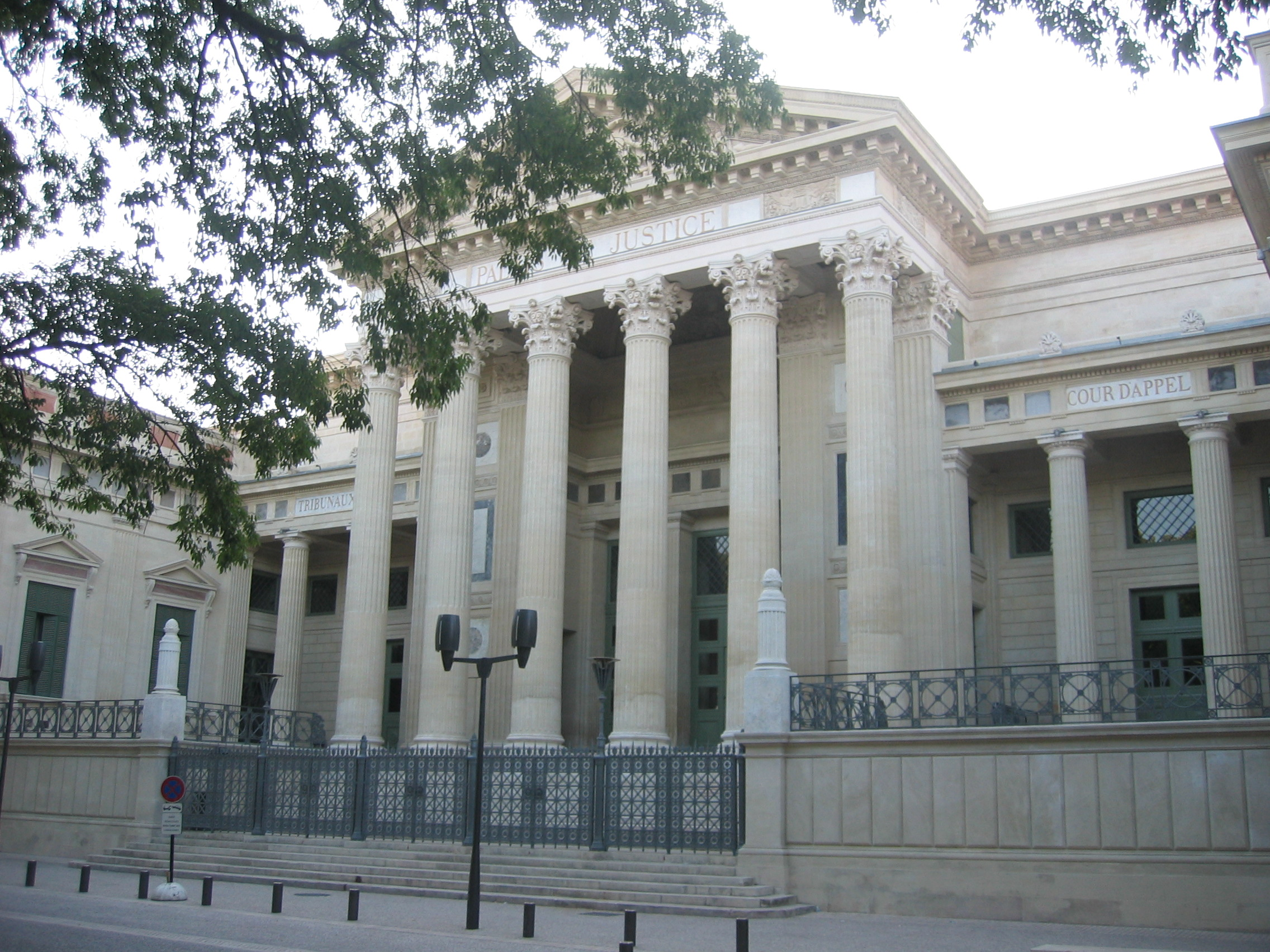 Le Palais de Justice de Nîmes. Photo de Nicolas Cadène. Propre travail, redistribution à l'identique.